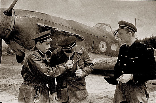 Французские летчики эскадрильи «Нормандия», сражавшиеся на советско-германском фронте Второй мировой войны